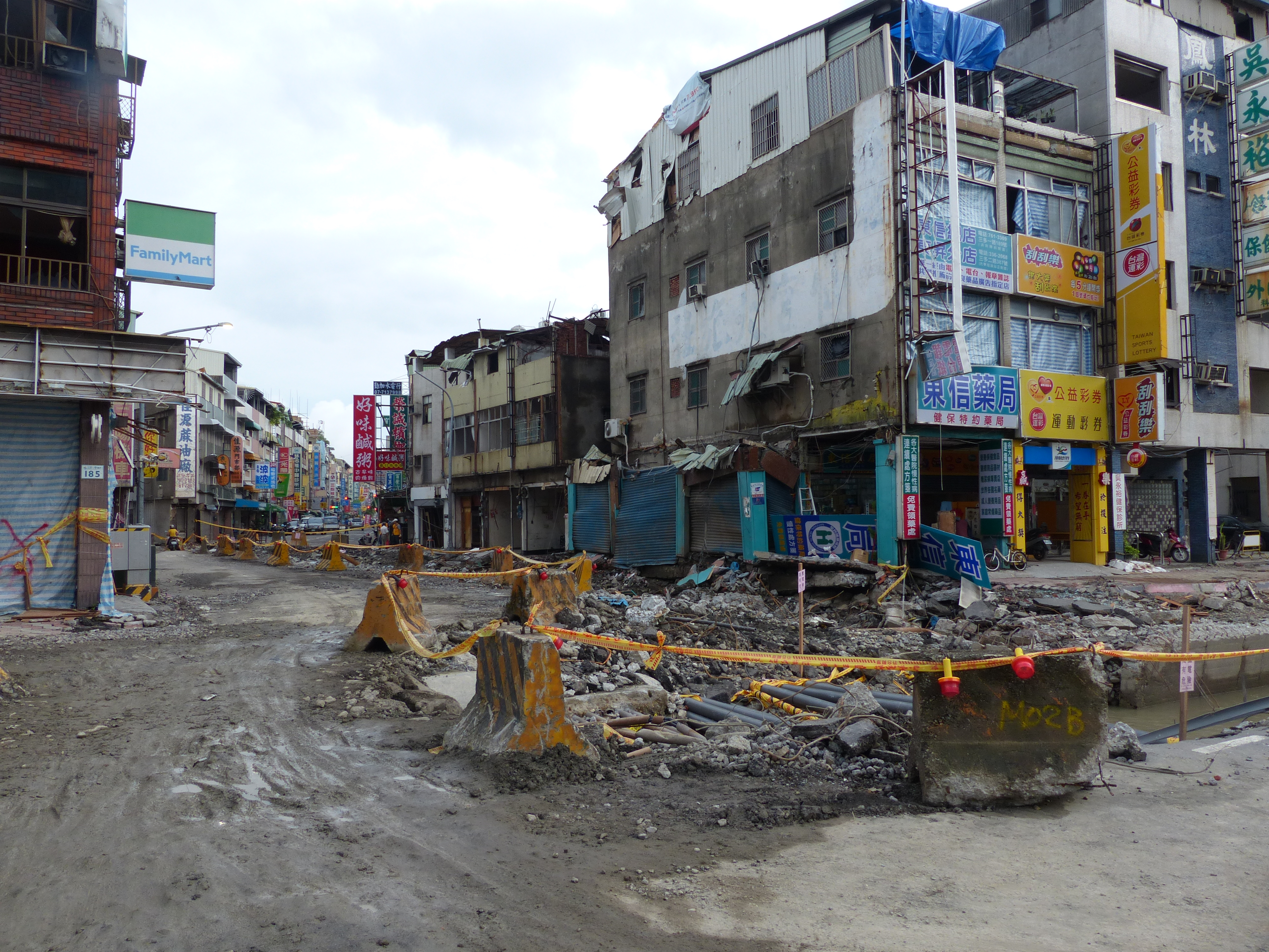 氣爆受創嚴重的高雄市苓雅區三多一路與武慶三路路口，攝於名貴大飯店前。